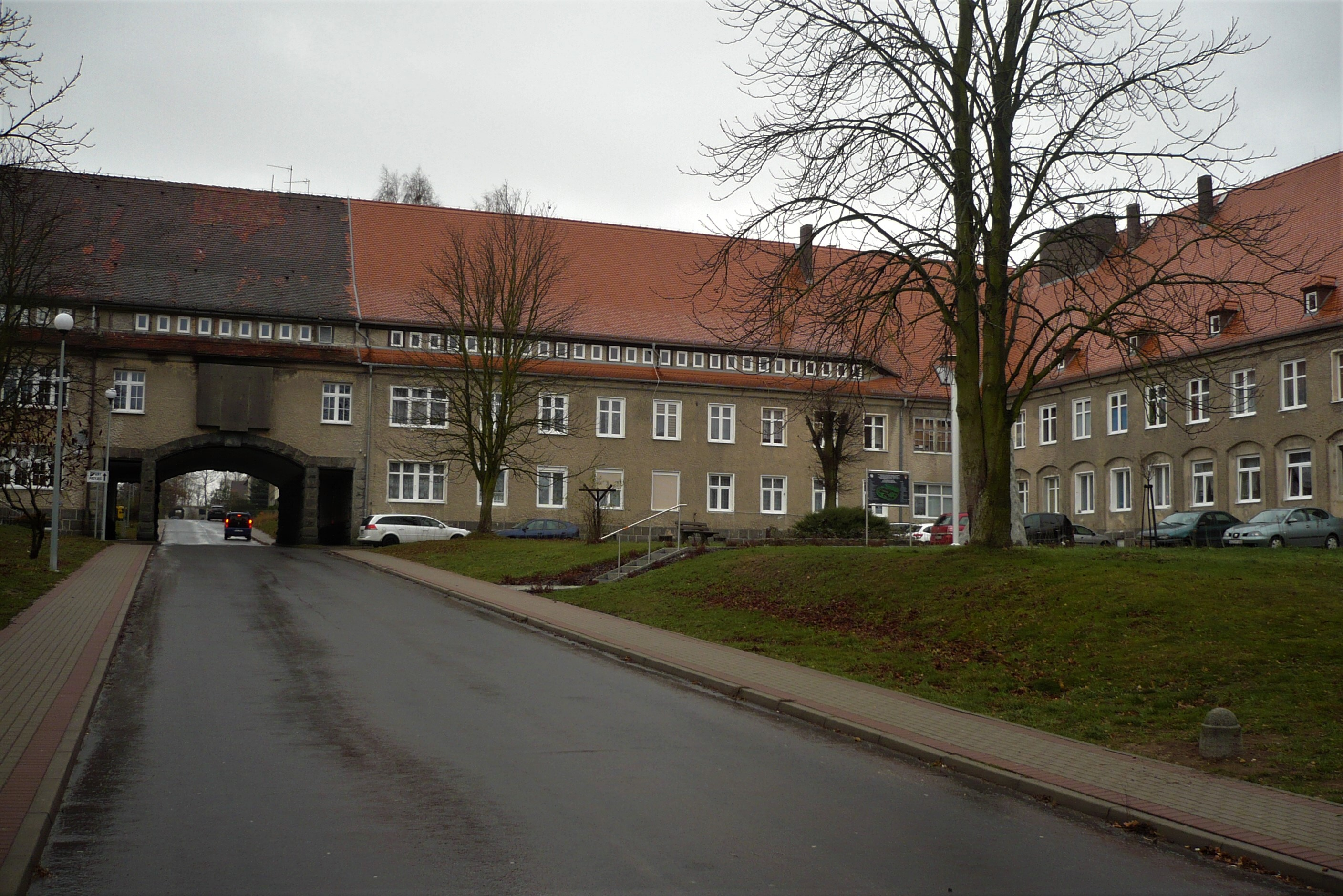 Sieniawka